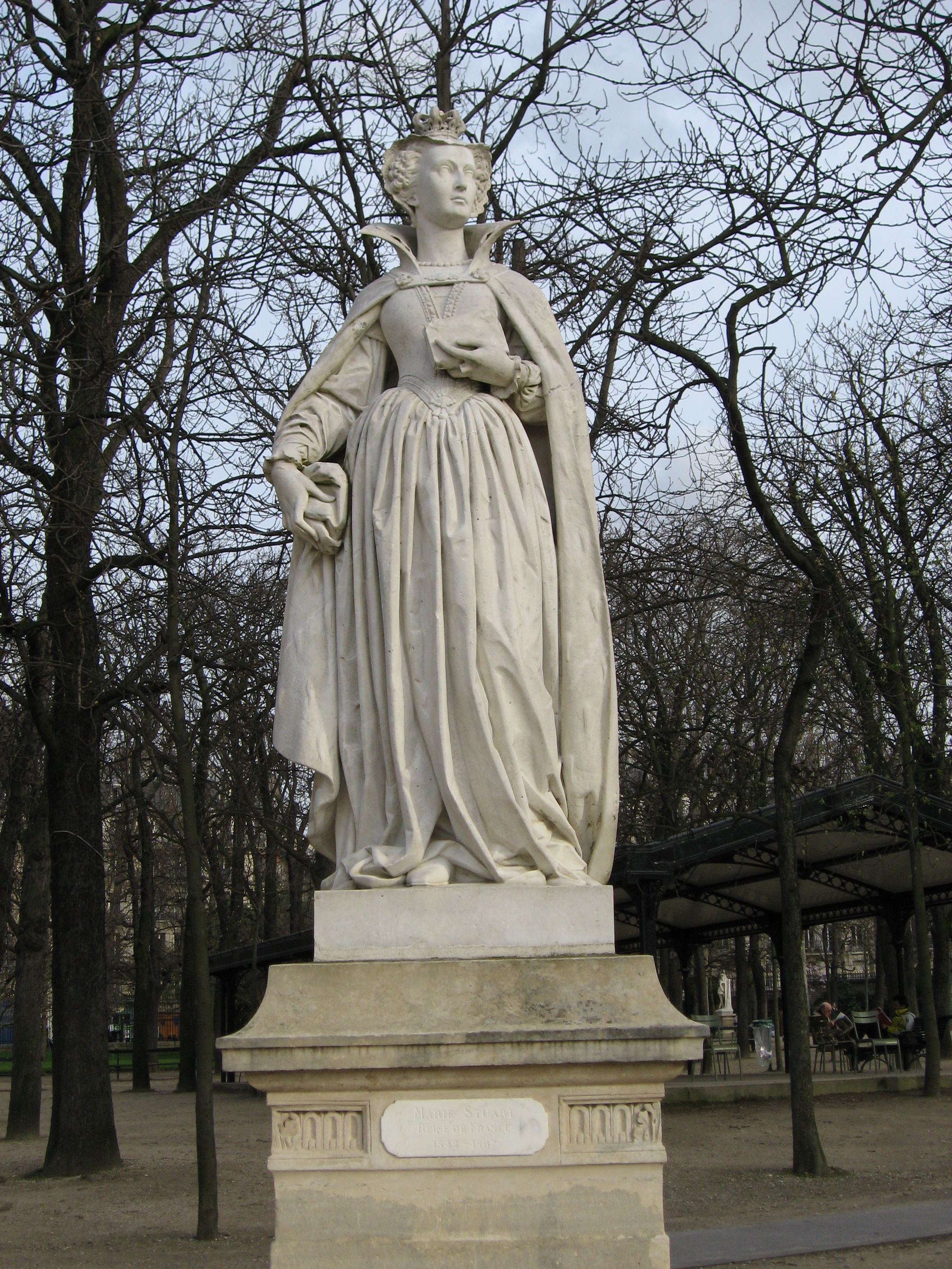 Marie Stuart, Reine de France (1542-1587)